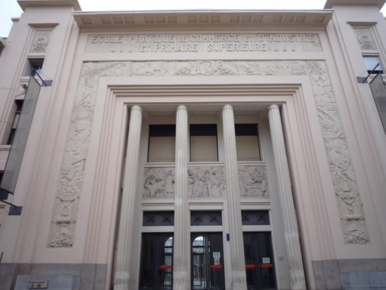 Lycée technologique régional Dhuoda, Rue Dhuoda, Nîmes, Gard, France